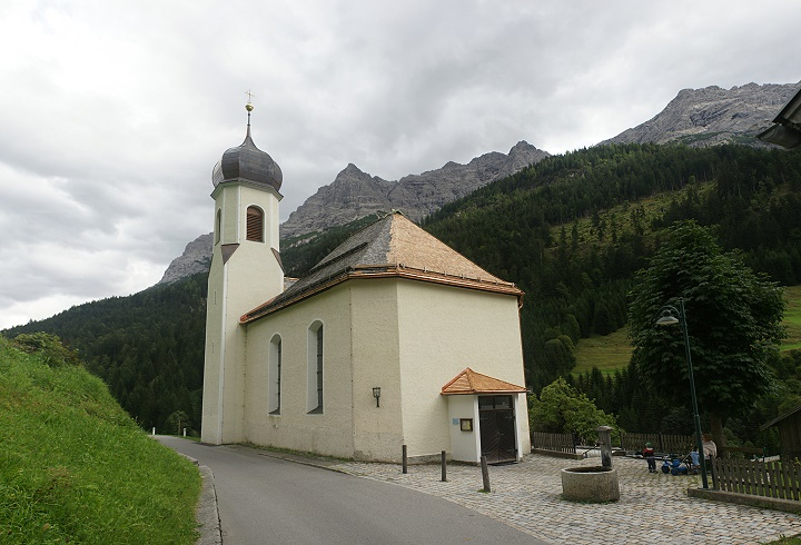 Kath. Pfarrkirche Unsere Liebe Frau vom Guten Rat, Friedhof christlich, Friedhof